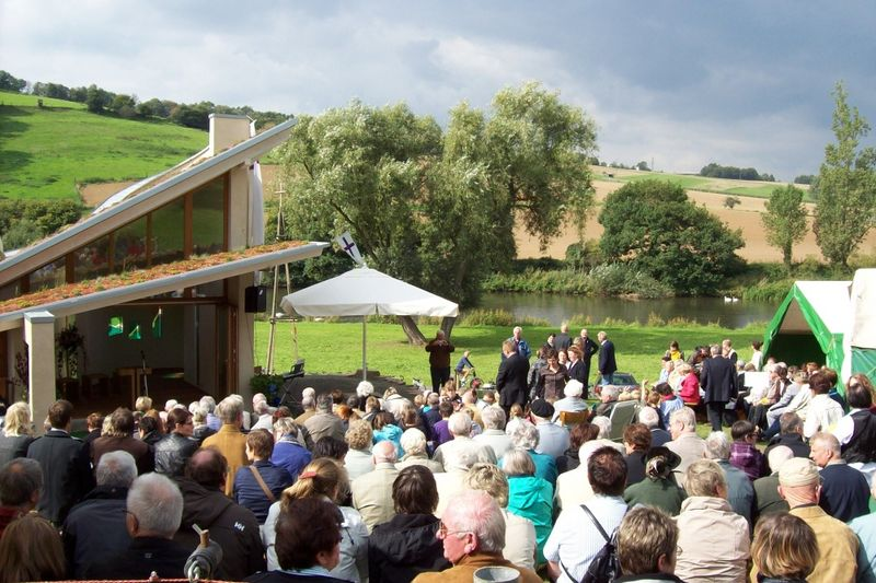 Einweihung der Kilianskapelle in Büchenwerra auf einem Platz am Fluss, direkt am Radweg R 1, idal für Wanderer und Radfahrer, die an der Kapelle eine Rast einlegen möchten.